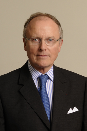 Jean Loup Kuhn-Delforge est ambassadeur de France en Grèce